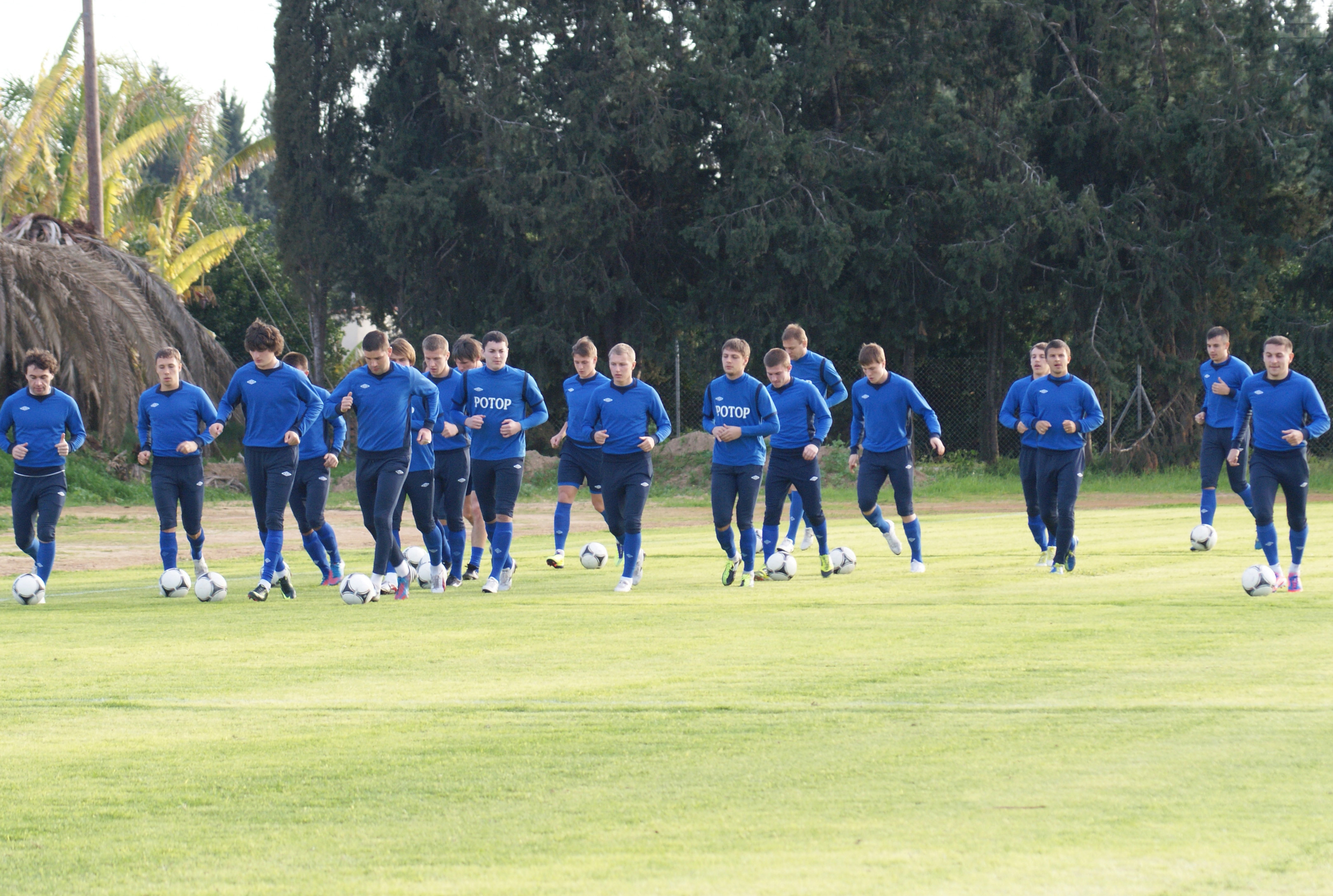 Разминка футболистов ФК «Ротор» на кипрском учебно-тренировочной сборе